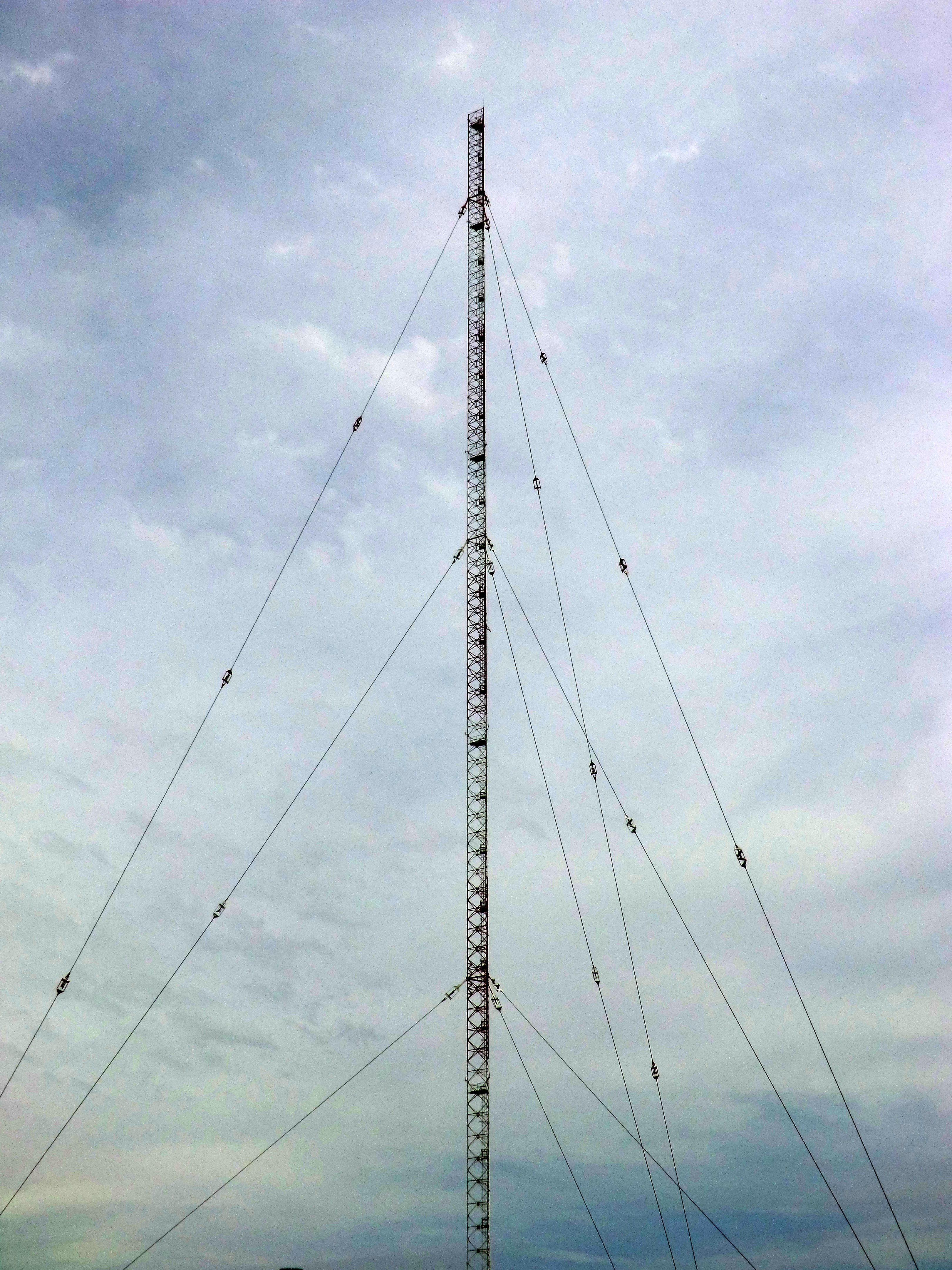 Émetteur de Tramoyes (fort contraste) en avril 2012.